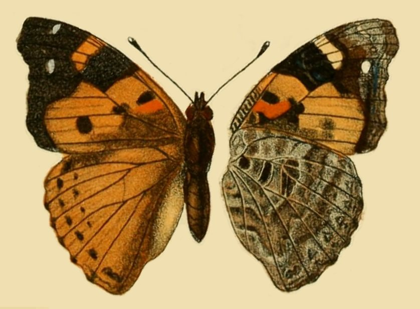 Vanessa samani, Hagen 1895